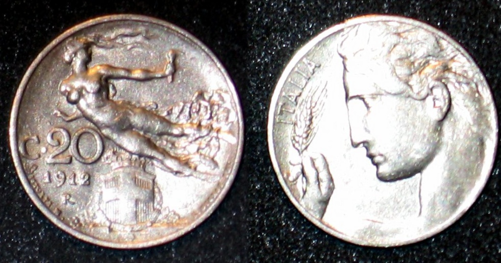 Moneta da 20 centesimi di lira - Regno d'Italia - 1912 20 centesimi - Italian coin of 1912 Ø 21.7 mm ǂ 1.7 mm nickel alloy